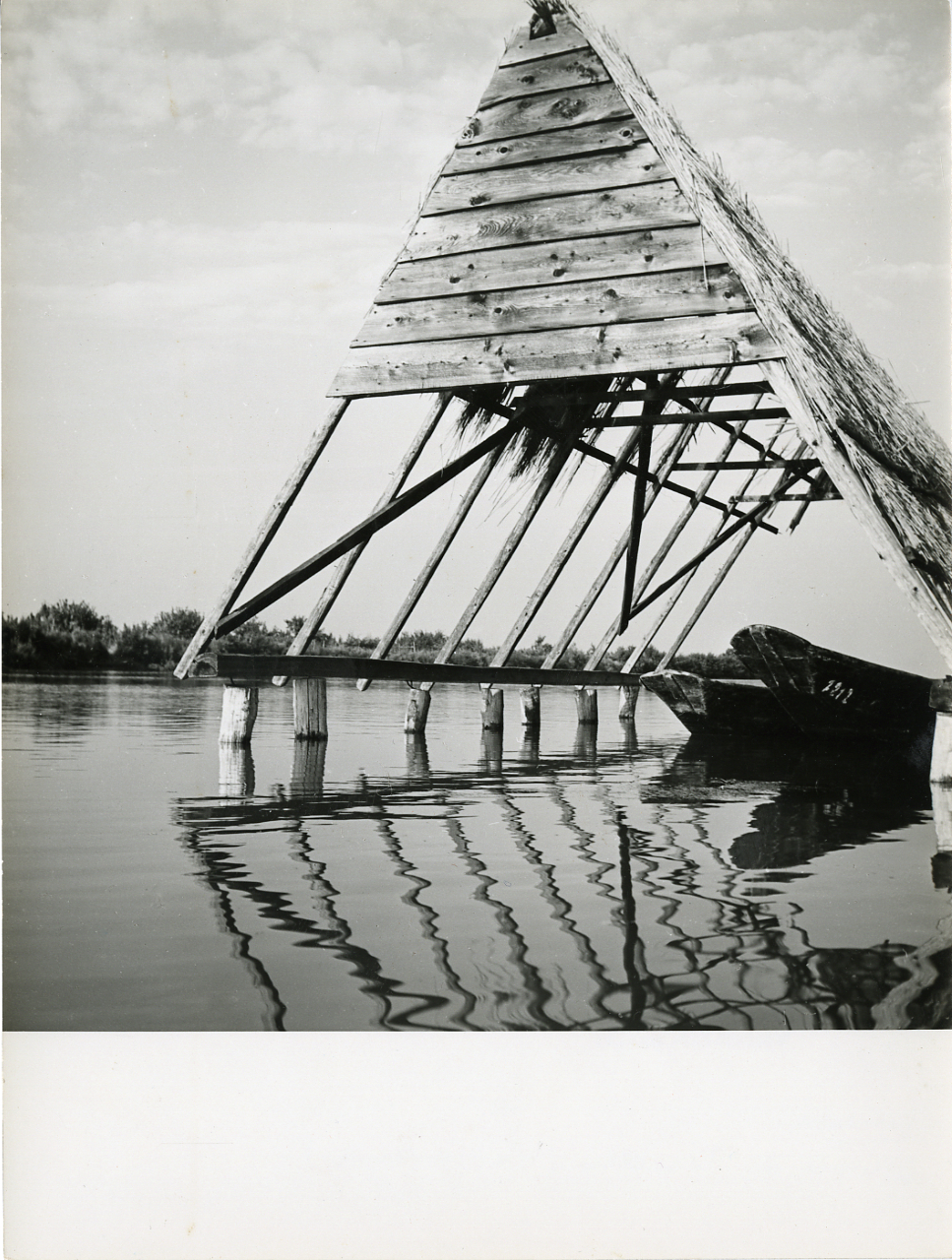 Serie fotografica : Venezia, 1955 / Paolo Monti, Istituto di fotografia Paolo Monti. - Stampe: 3 : Positivo b/n, gelatina bromuro d'argento/ carta, 18x24, 24x30. - ((Al verso delle stampe manoscritti i numeri secondo numerazione interna alla serie di stampe: "Torcello"?: 28, 29; iscrizioni didascaliche manoscritte a matita: "Venezia/ Canale di Torcello/ (La cavàna); timbri a inchiostro con copyright: "Paolo Monti/ Cannaregio 4633/ Venezia (Italy)"; "© Copyright/ Credit to:/ Istituto di Fotografia/ Paolo Monti/ [...] Milano - Via Flavio Vegezio [...]/ Neg. N. [...]". - Sul coperchio della scatola iscrizione didascalica manoscritta a pennarello nero: "Venezia".